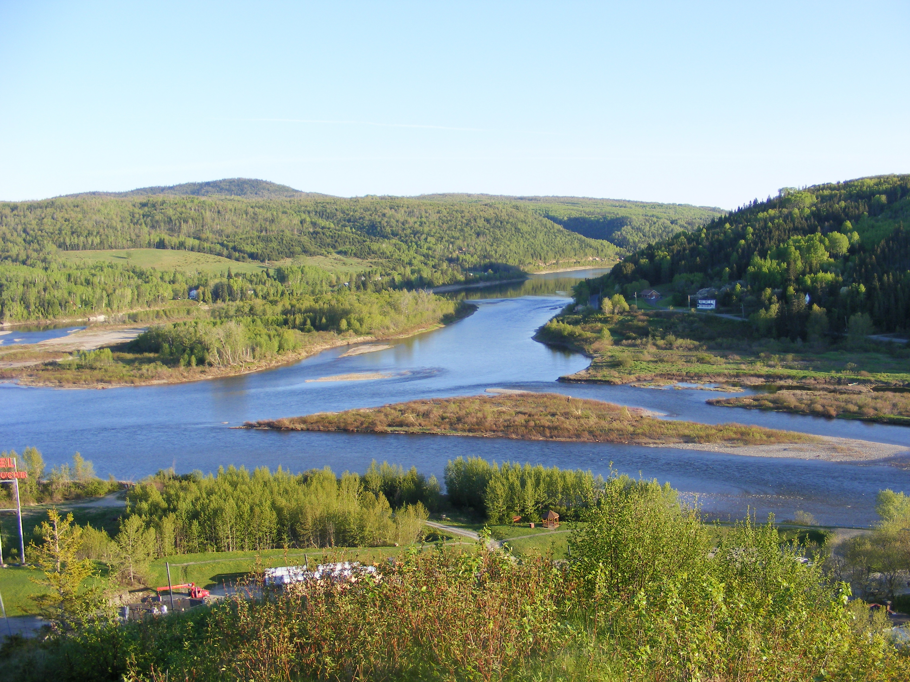 Deux splendides Rivière, la Matapédia et la Restigouche